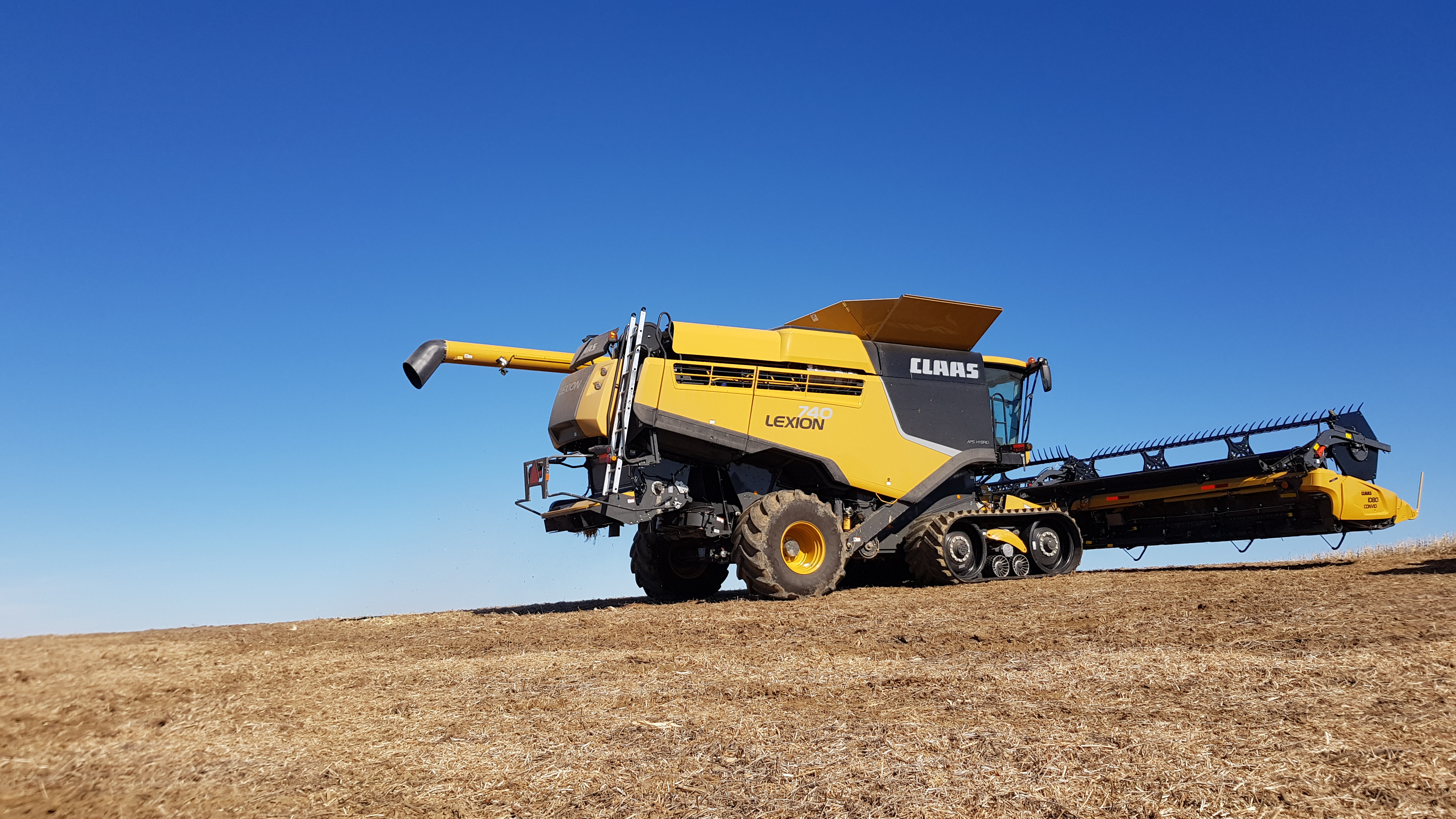 CLAAS LEXION 740 mit CONVIO 1080 in der Sojaernte